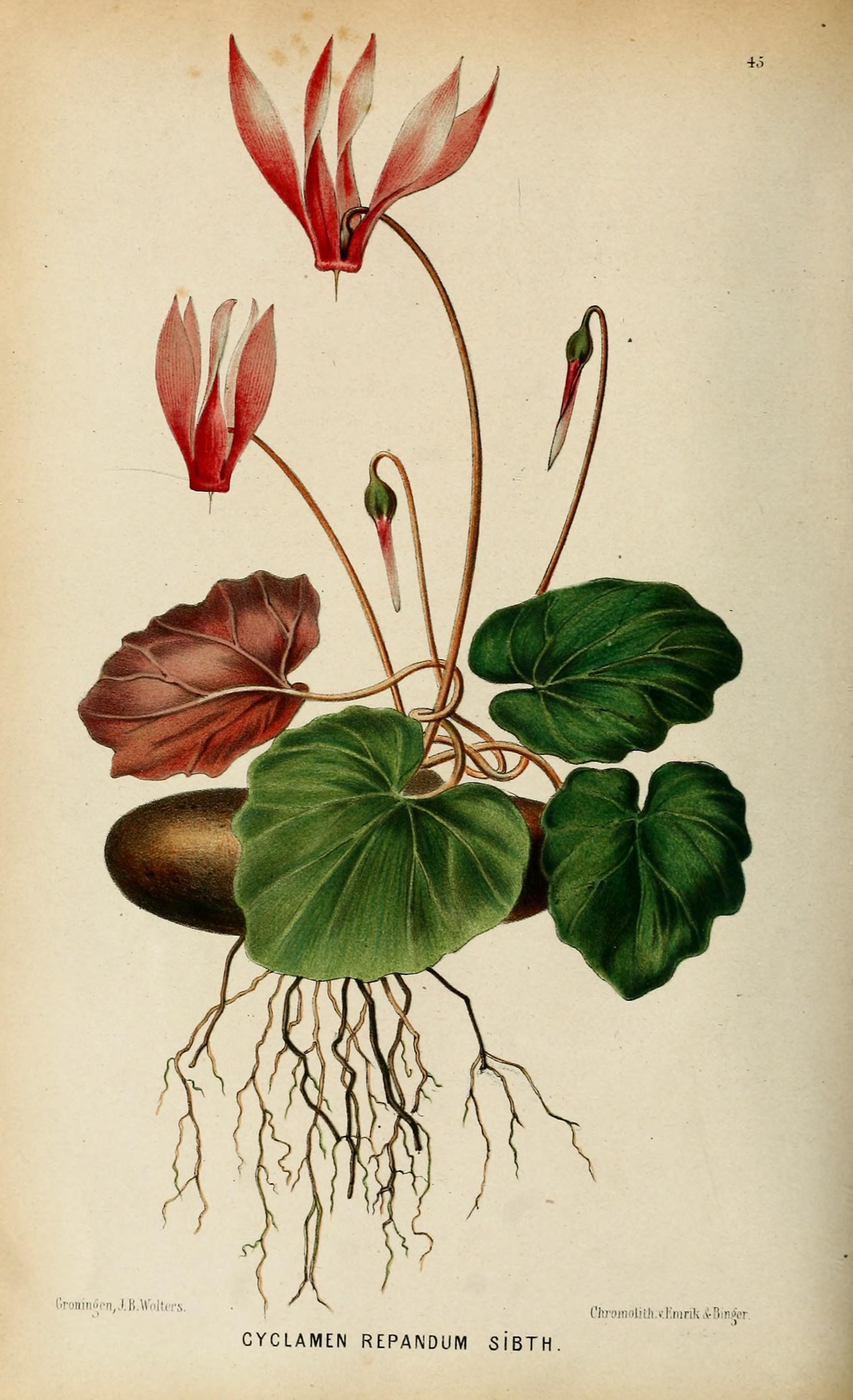 40 l.roninóen, . B Cl i ,;: ' • I mrik .■". n 'm CYCLAMEN REPANDUM SÏBTH.